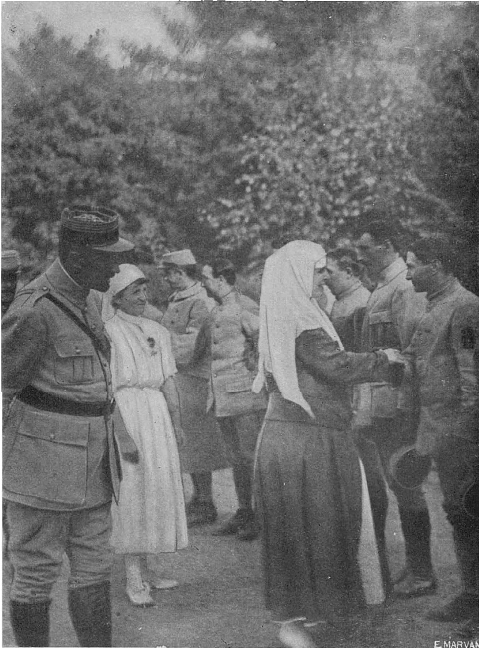 Regina Maria în vizită la sanatoriul Carpaţi, România, august 1917.